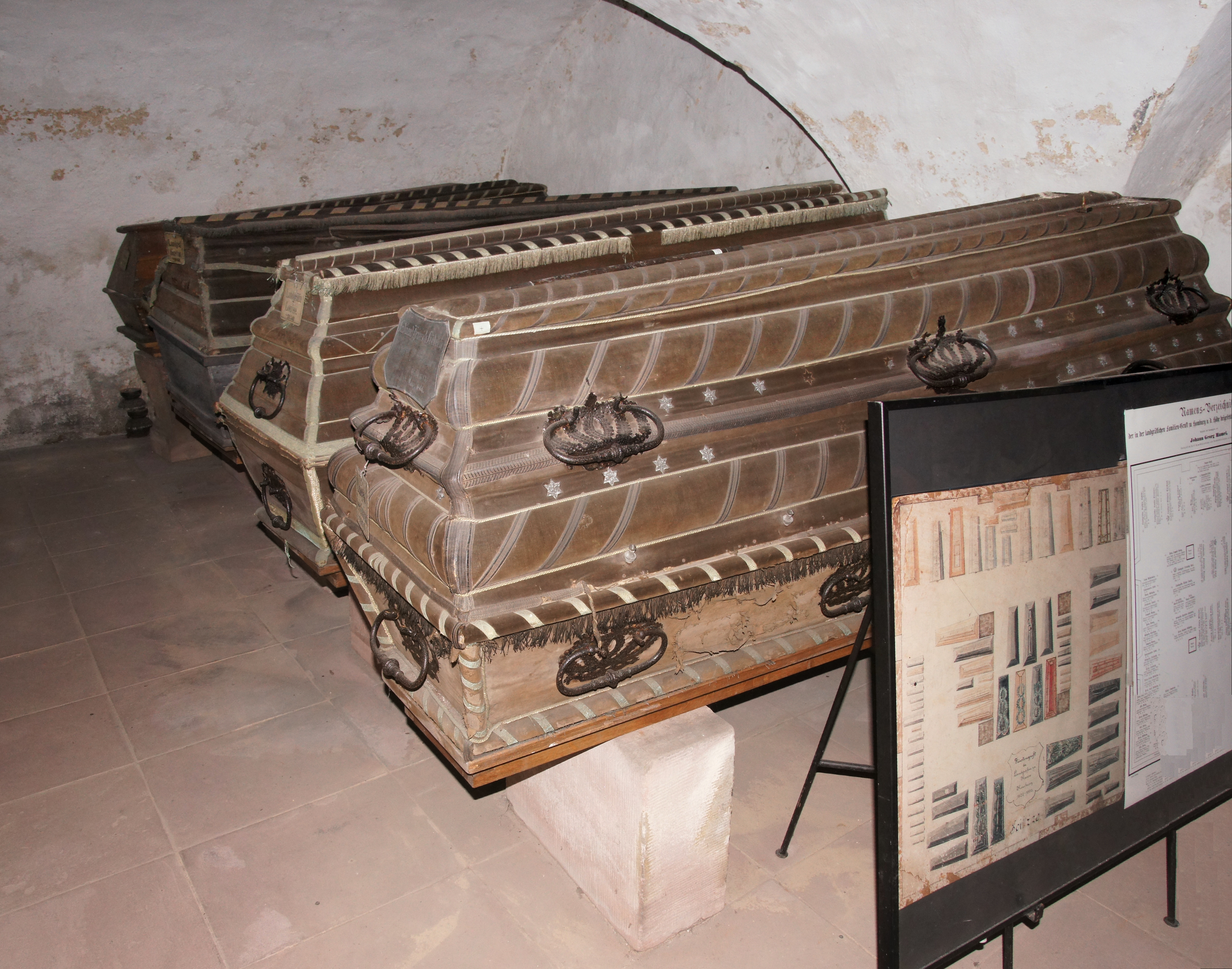 Bad Homburg vor der Höhe, Schloss, Gruft, Landgraf Gustav, Landgräfin Luise